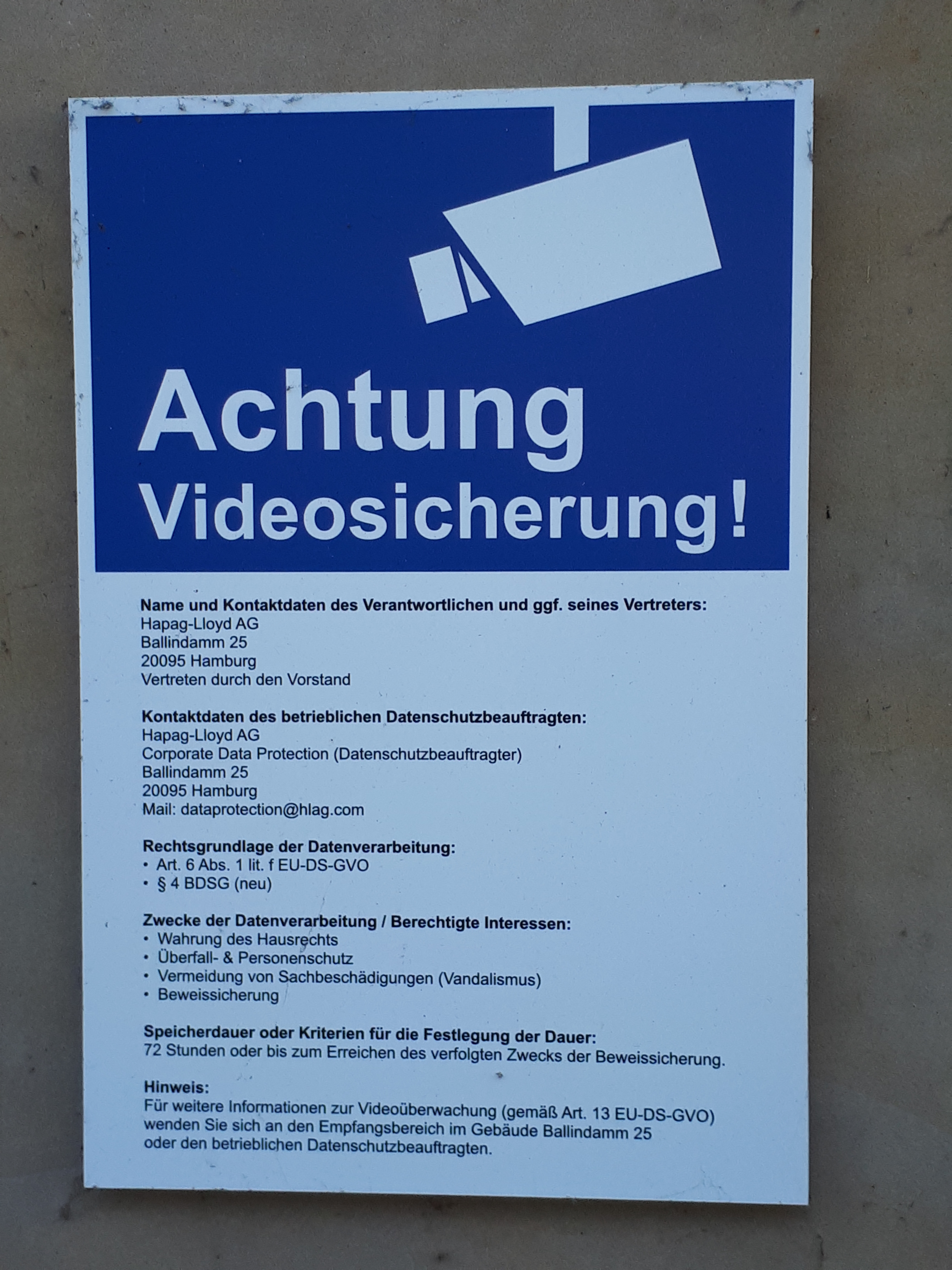 Datenschutz Erklärungen gemäß DSGVO neben einer Kamera im öffentlichen Bereich, im Zentrum von Hamburg; Übersichtaufnahme: File:Aussekamera in HH mit DSGO Angaben.jpg